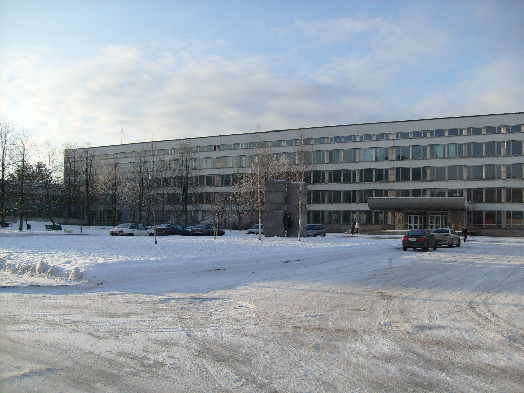 Физический факультет СПбГУ